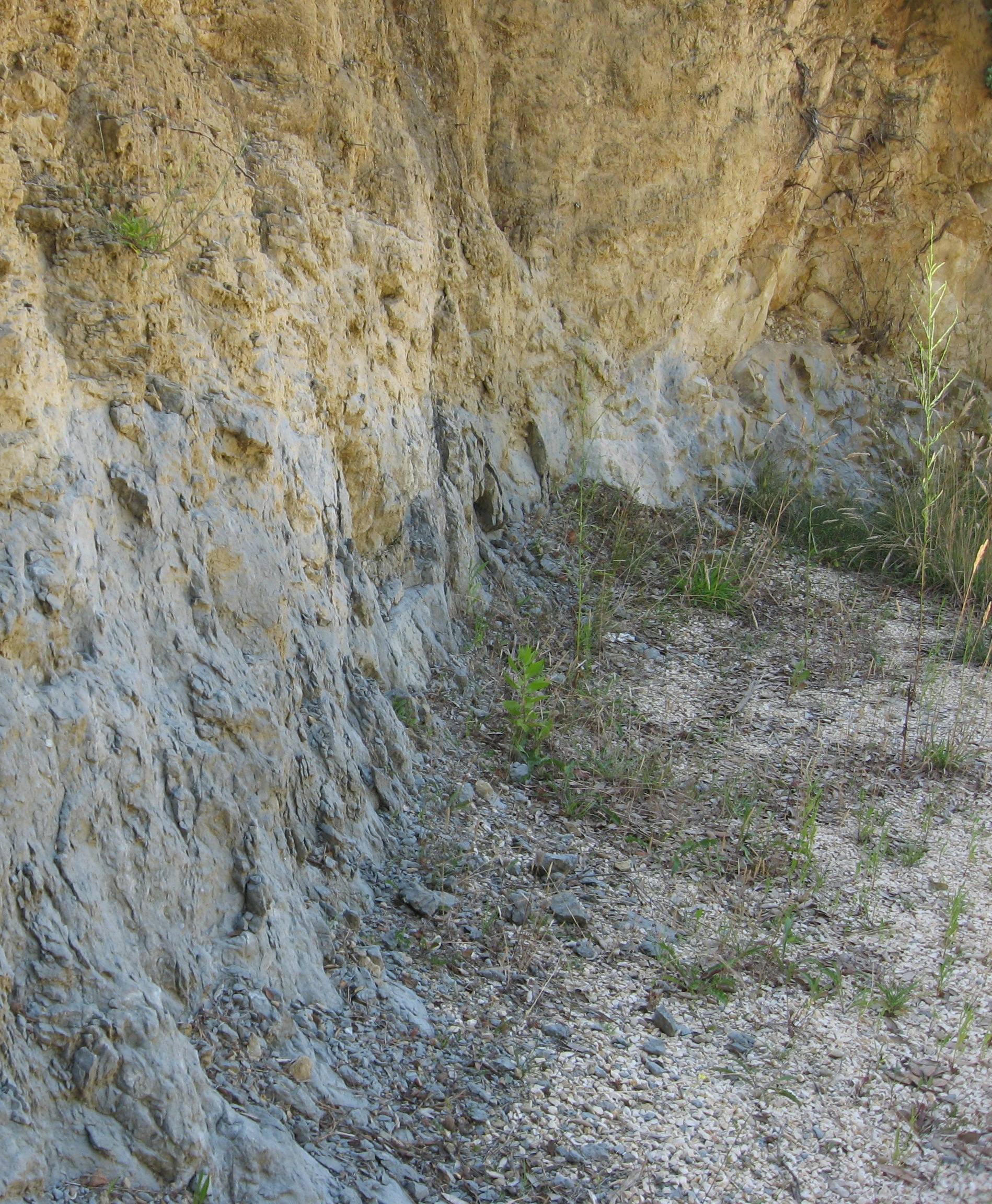 Lopar (Rab) 2014_08 - Punto di incontro tra lo strato di roccia in arenaria sovrastante lo strato geologico di roccia calcarea